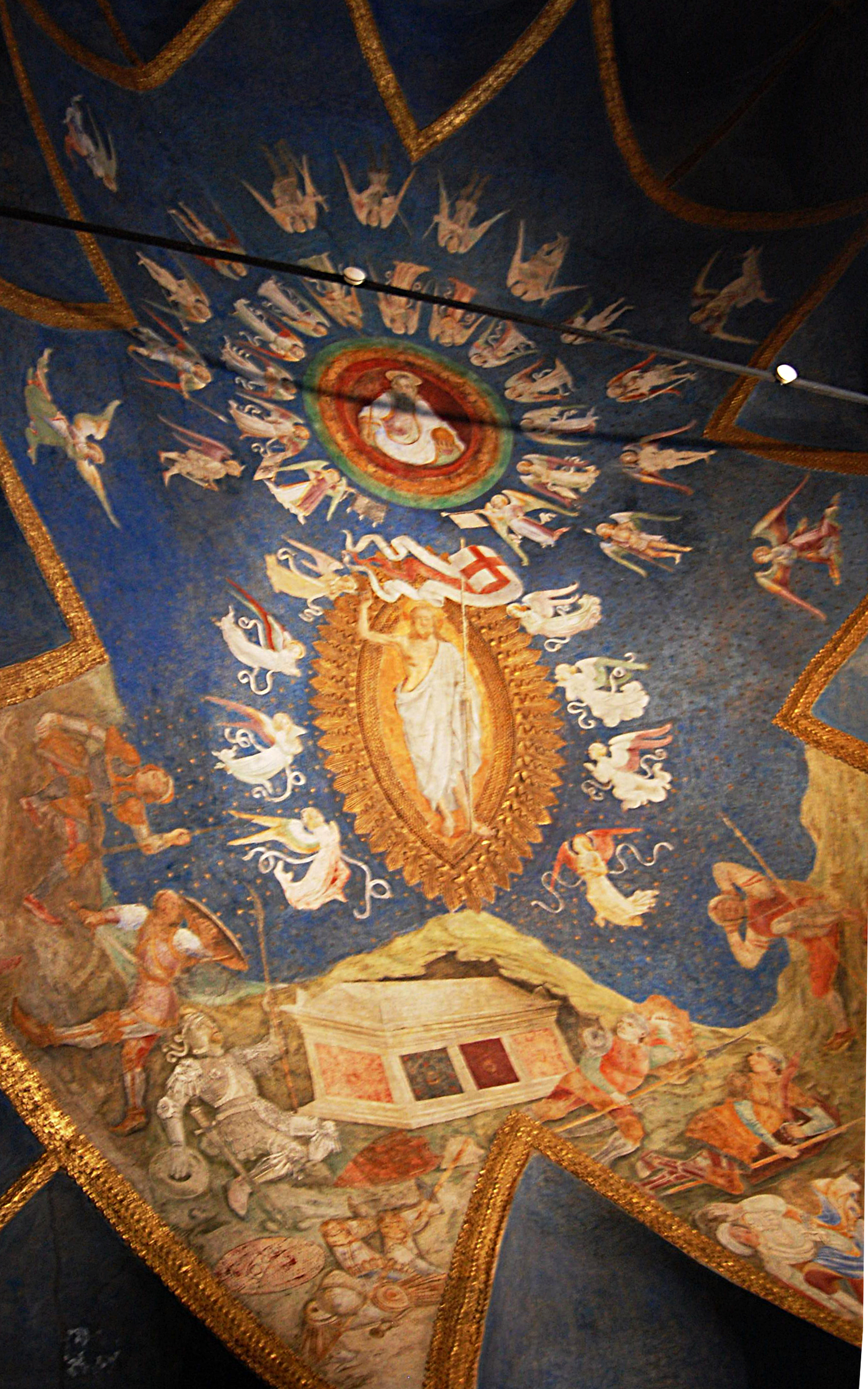 Castello Sforzesco di Milano. Museo d'Arte Antica. Cappella Ducale (XII)